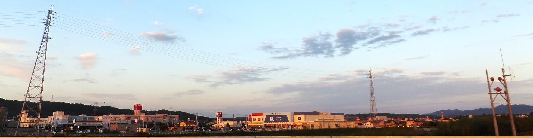 兵庫県三木市大村